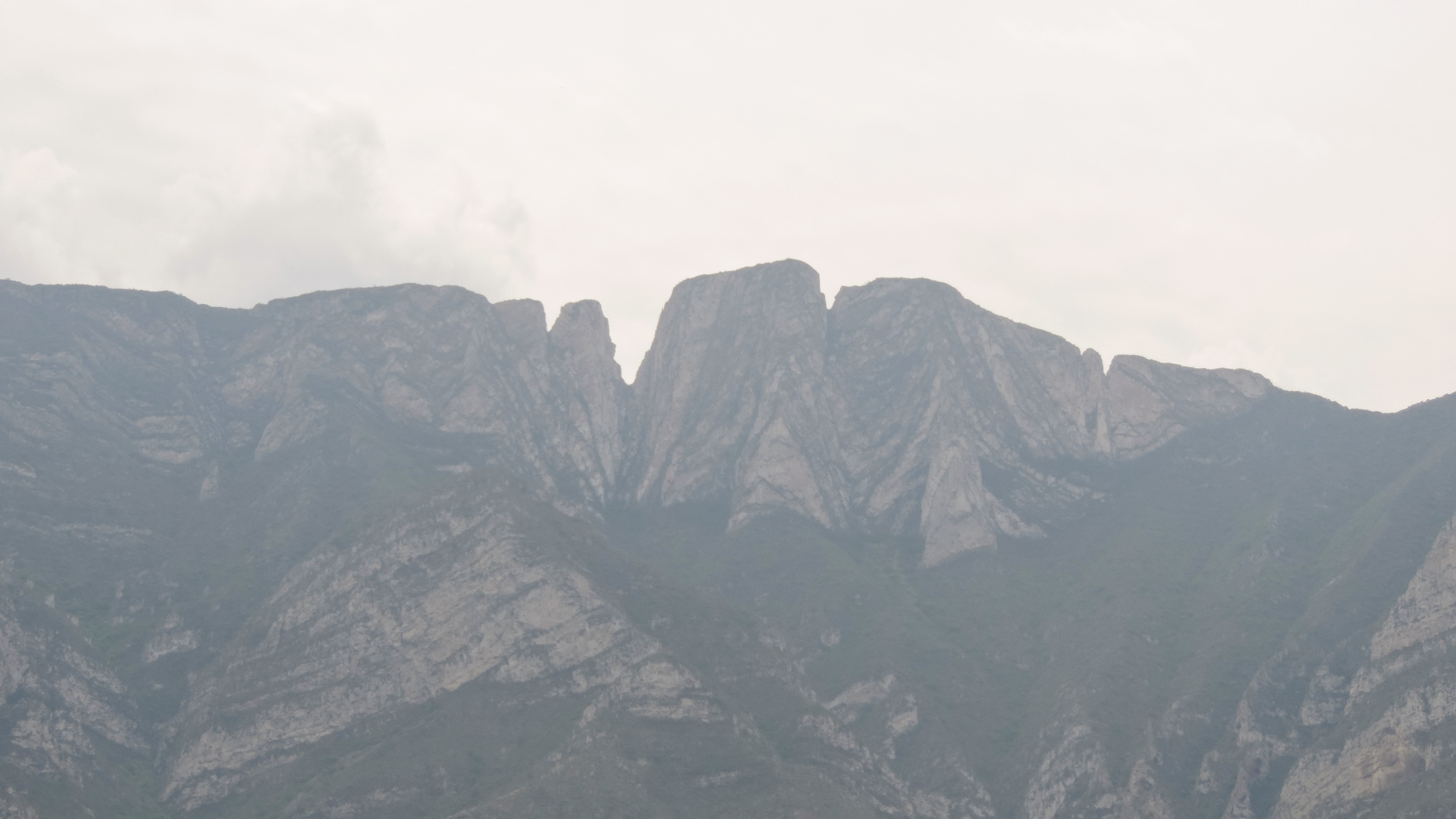 Pico de montaña